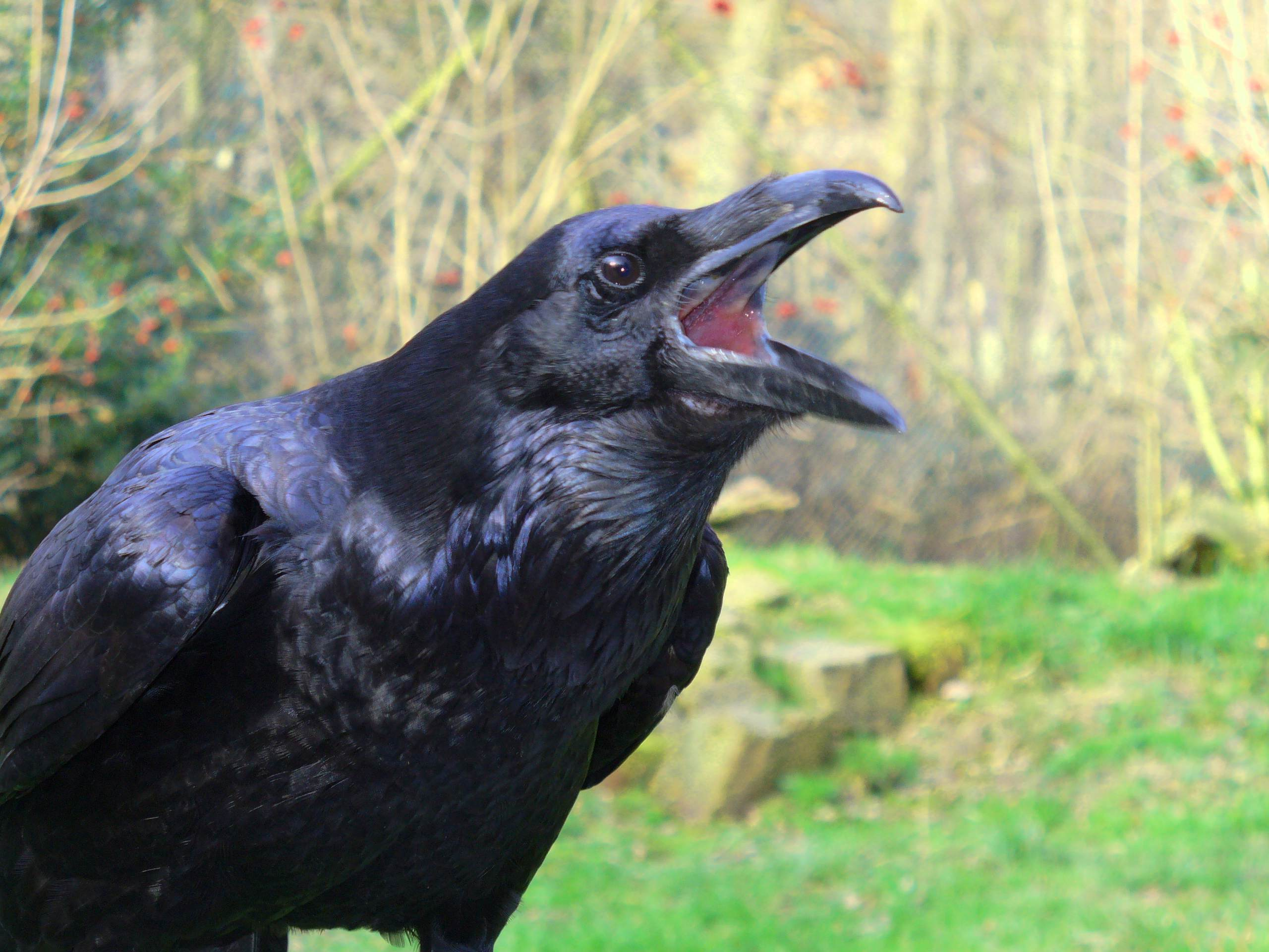 raven (Corvus corax)